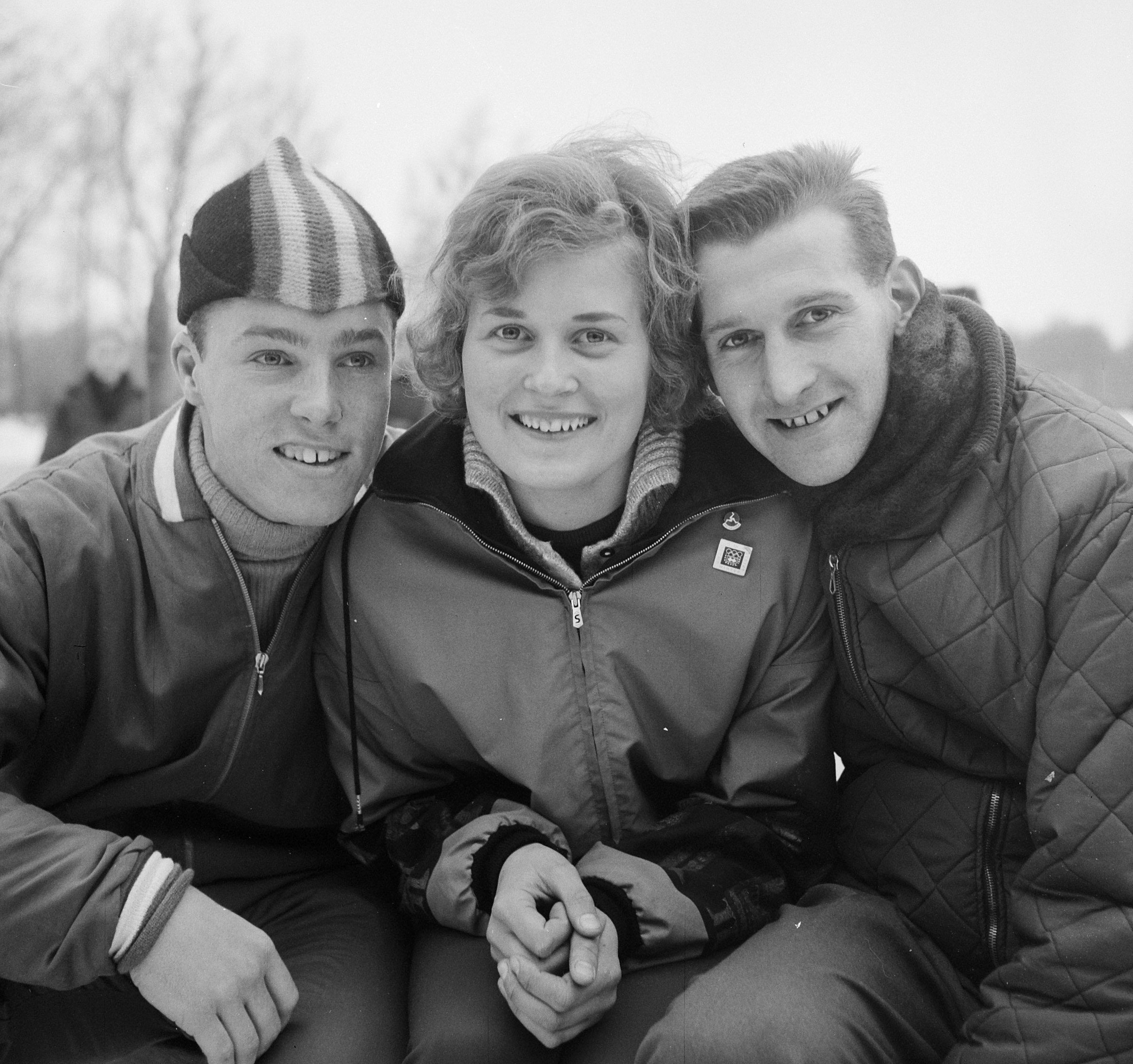 Langebaan kampioenschappen te Groningen verreden, v.l.n.r Rudi Liebrechts , Willi de Beer en Arie Zee.